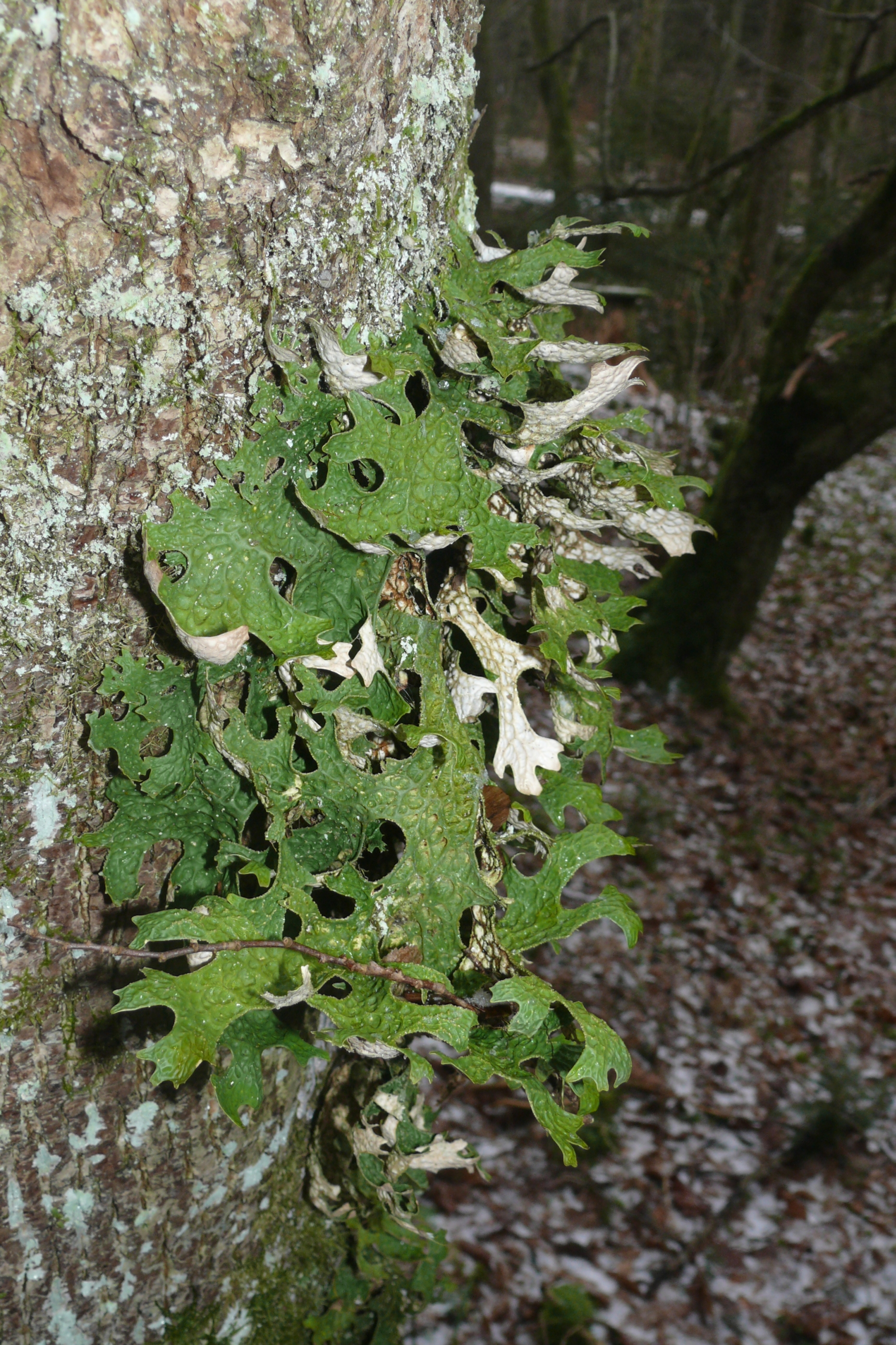 Lobaria pulmonaria, Schwäbisch-Fränkische Waldberge, Germany